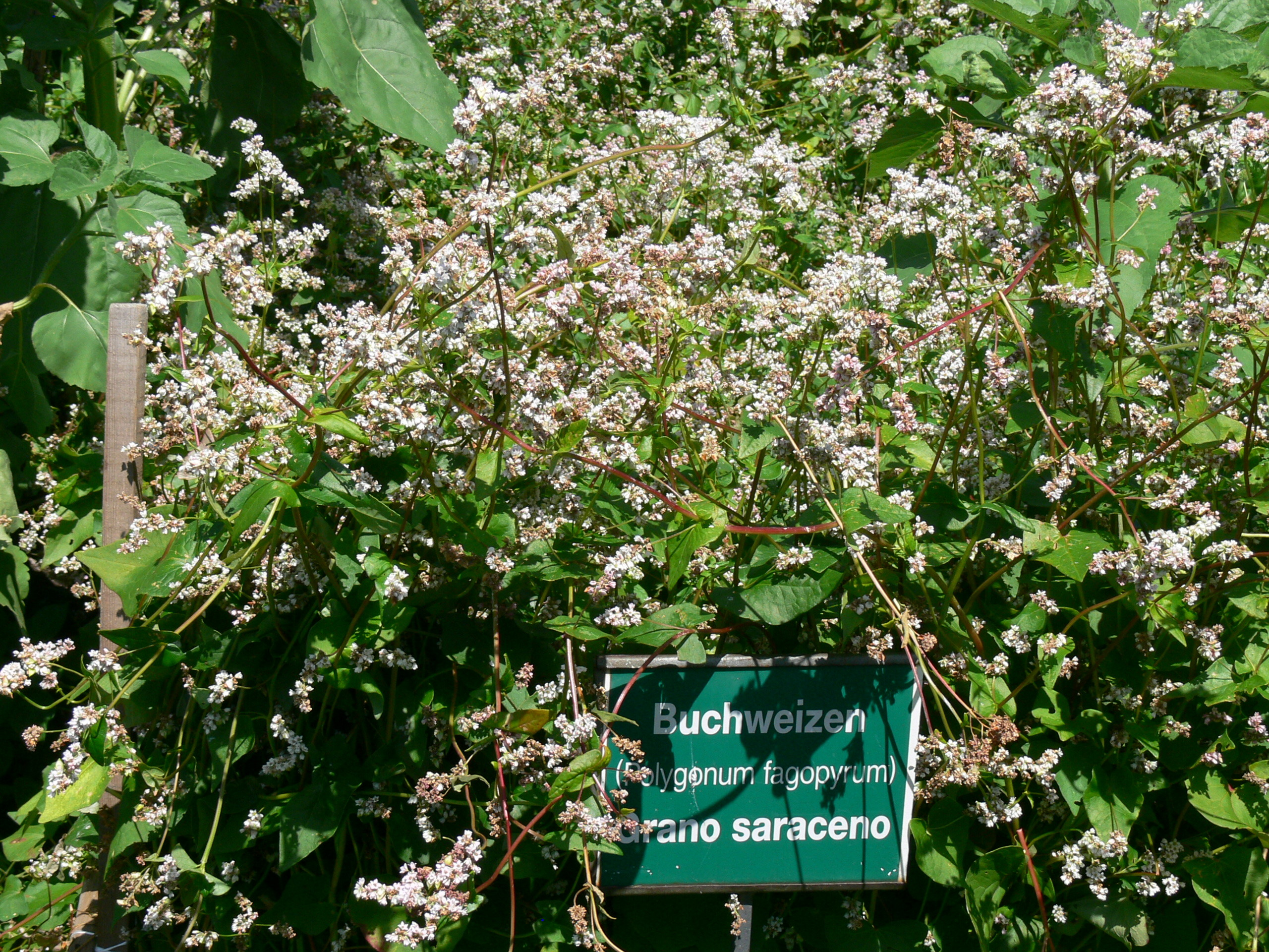 Fagopyrum esculentum (syn. Polygonum fagopyrum). Volkskundemuseum Dietenheim in Südtirol. Bauerngarten: Buchweizen